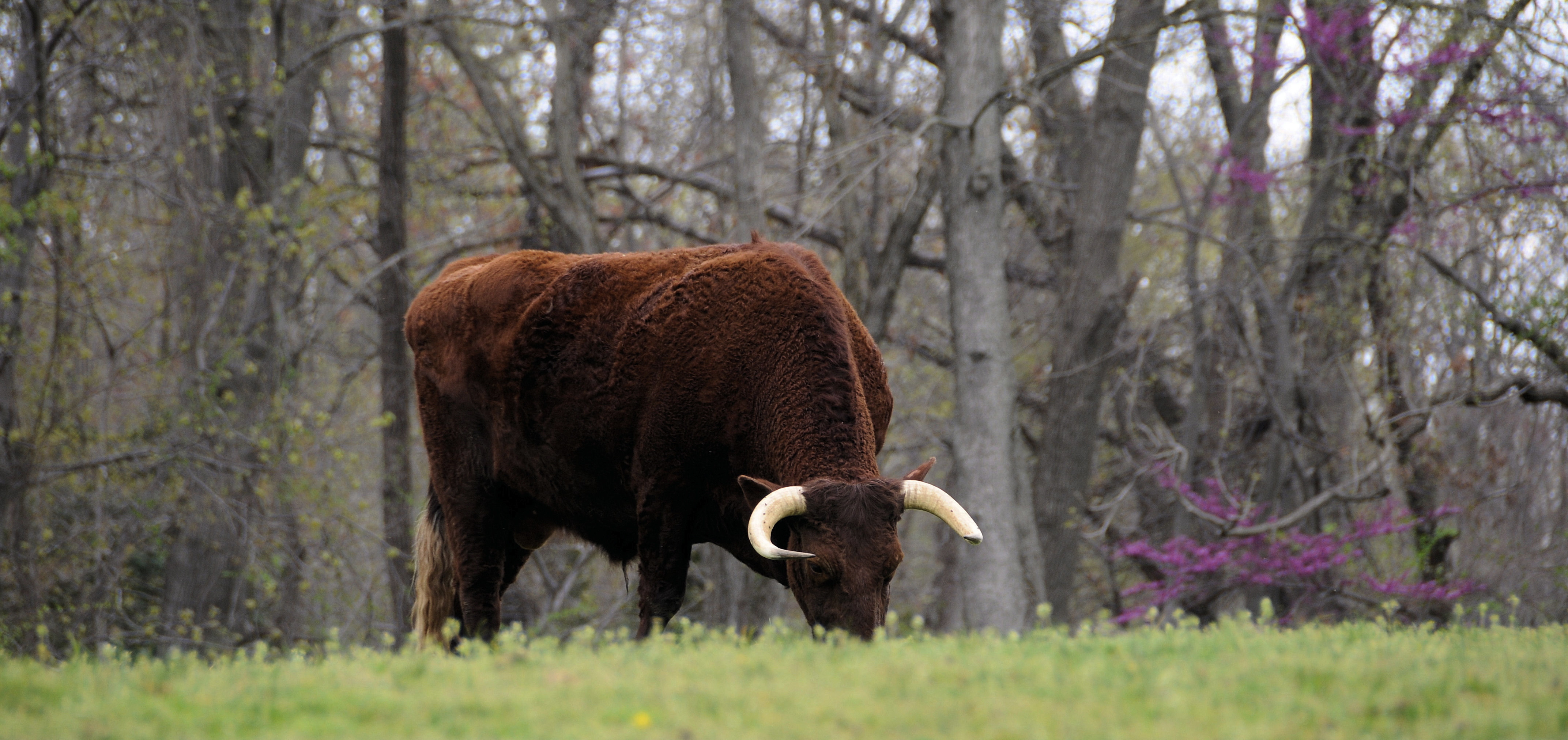 A Milking Devon at Mount Vernon.